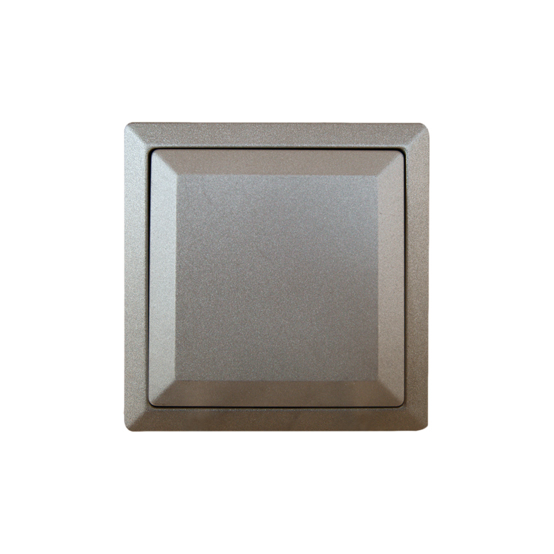 Łącznik jednobiegunowy serii Classic, 1997 rok. Ówczesna nazwa producenta: Południowe Zakłady Przemysłu Elektrotechnicznego „POLAM-KONTAKT”.